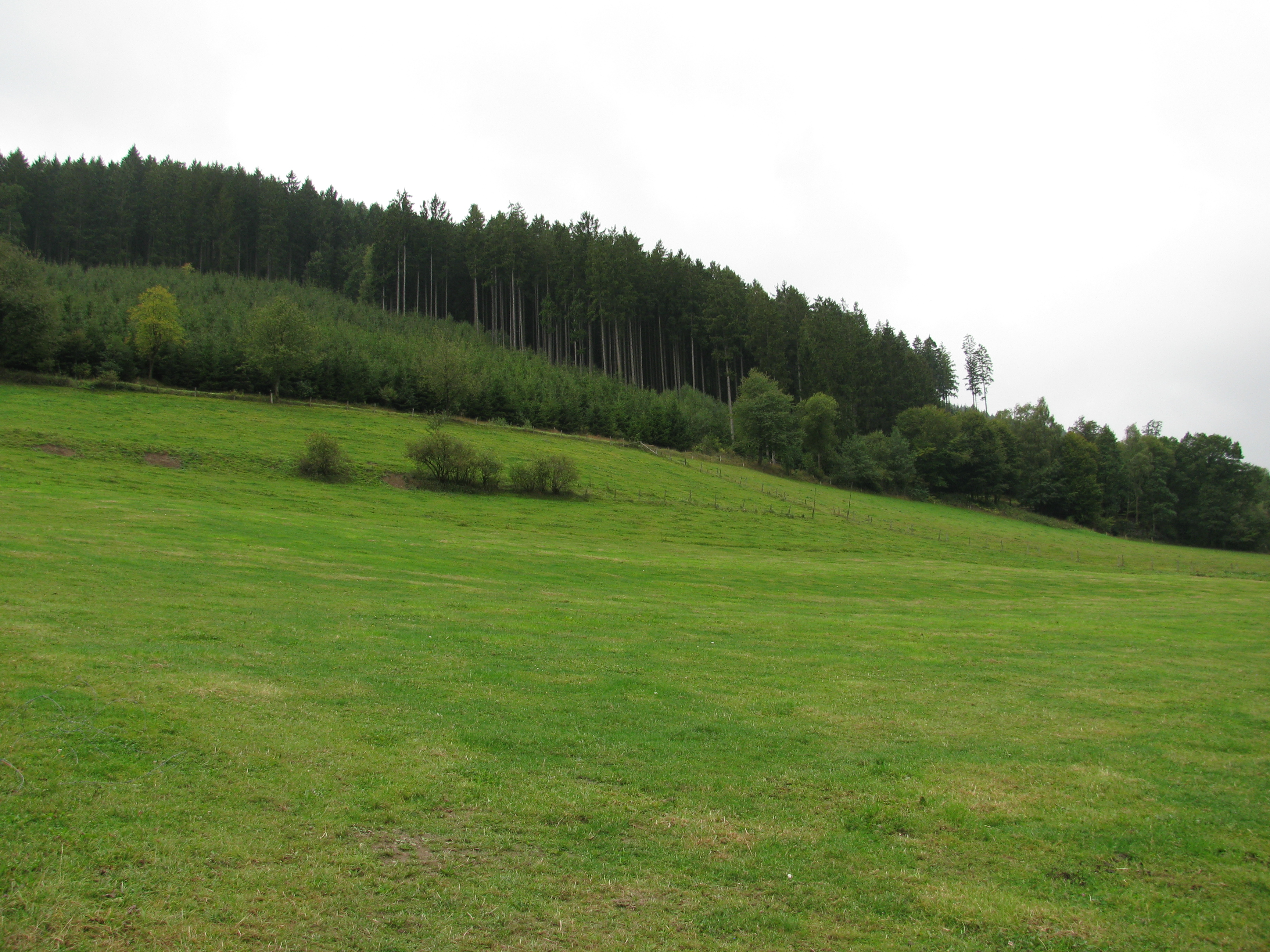 Blick vom Ende der Straße Am Hackebeil in Schmallenberg-Lenne nach Südwesten auf den Hang des Kähling als Teil des Landschaftsschutzgebiets „Ortsrandlage und Restgrünland um Lenne“